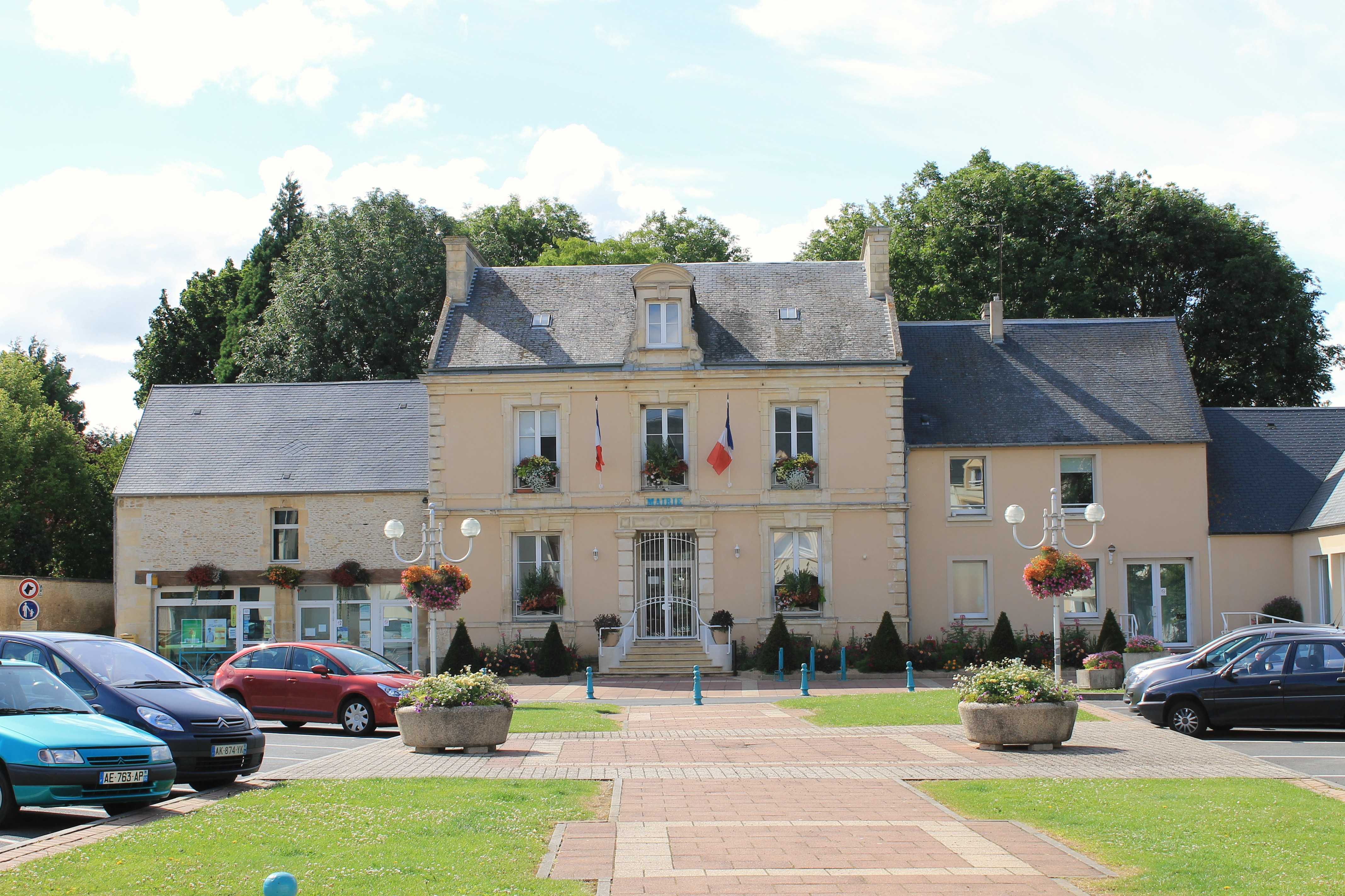 mairie de Soliers (Calvados)